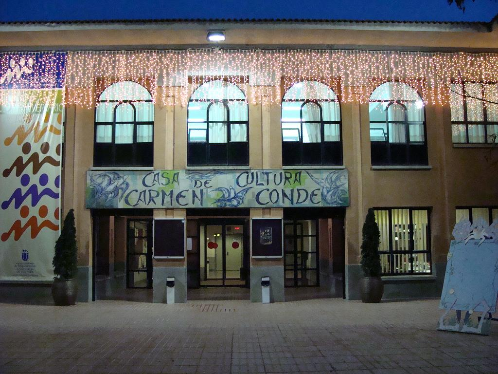 Casa de Cultura Carmen Conde, Majadahonda, Comunidad de Madrid.